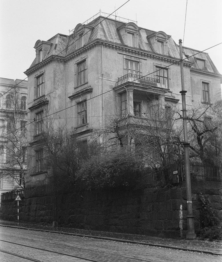 Briskebyveien 3 fotografert i 1966 av Kari Paulsen. Siden revet. Fra Byhistorisk samling hos Oslo Museum.